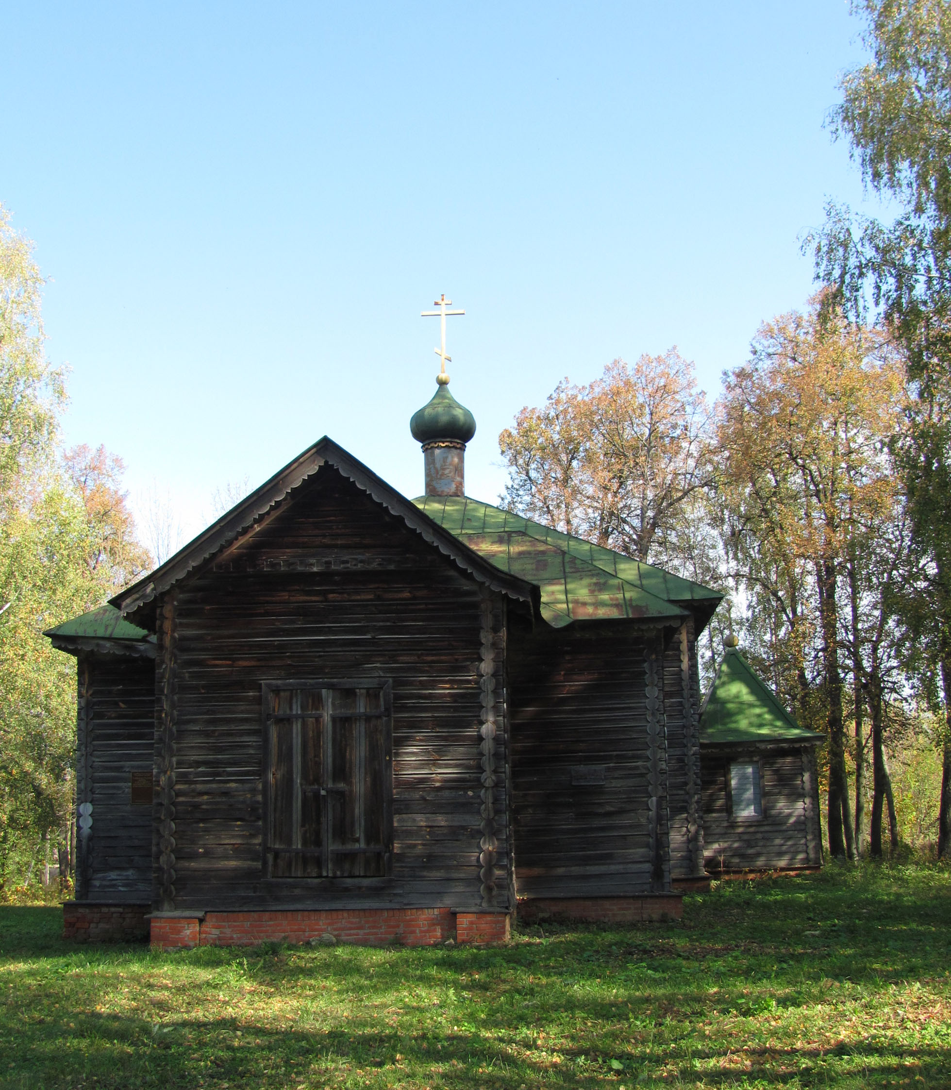 Церковь А. Невского во Львовке (Большеболдинский район, Нижегородская область, Россия)